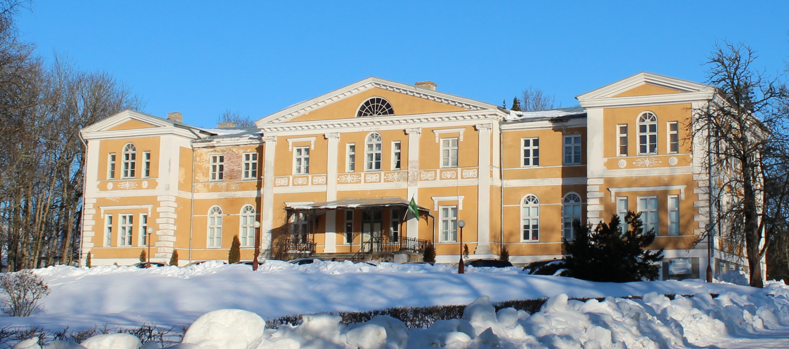 Kuremaa loss (Kuremaa mõisa peahoone)